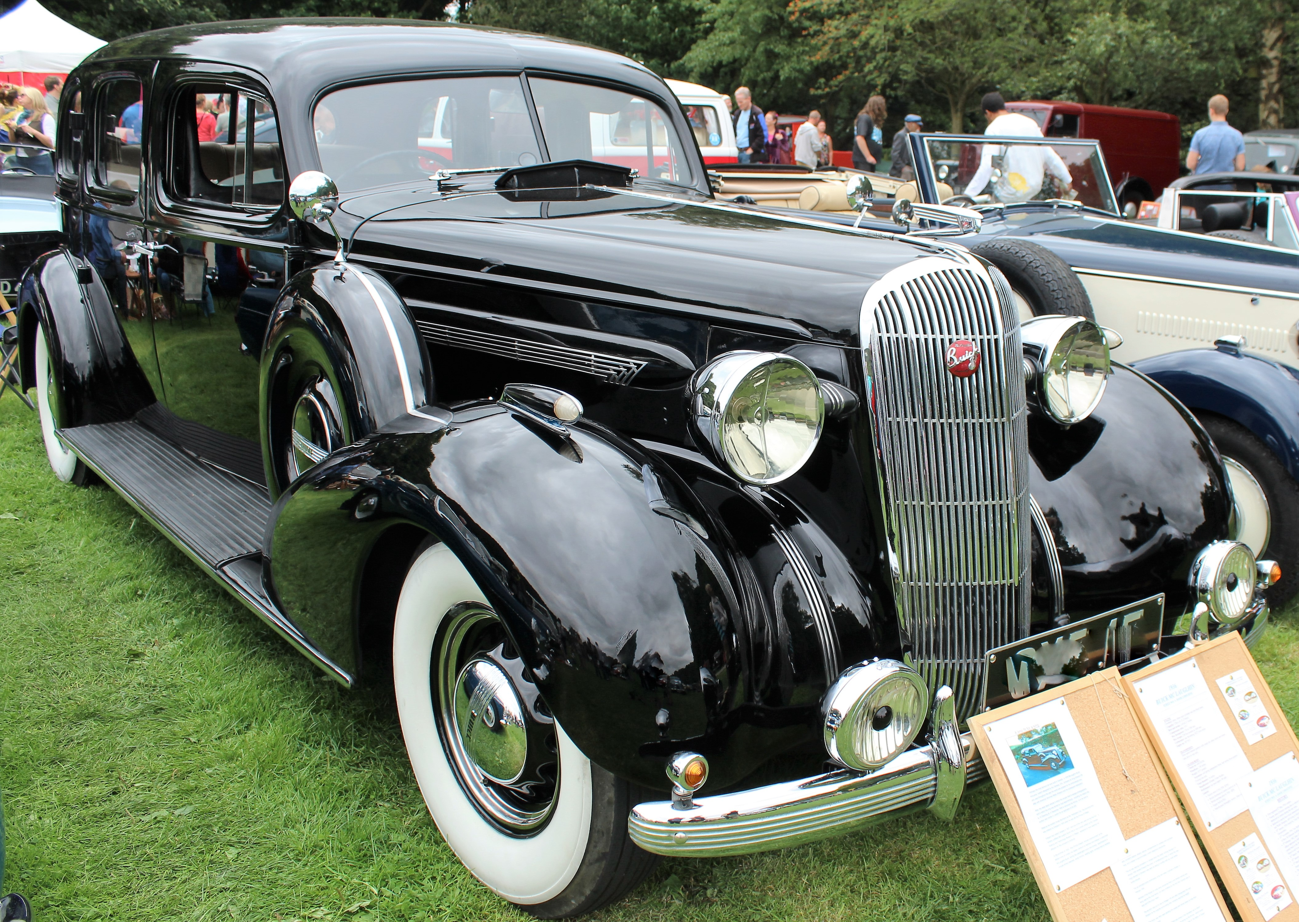 Hebden Bridge Vintage Weekend Sunday 7th August 2016